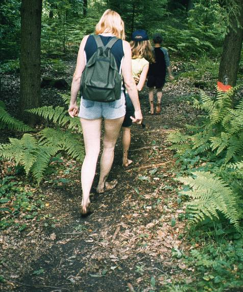 Walderlebnis auf dem Barfußpfad Nienhagen